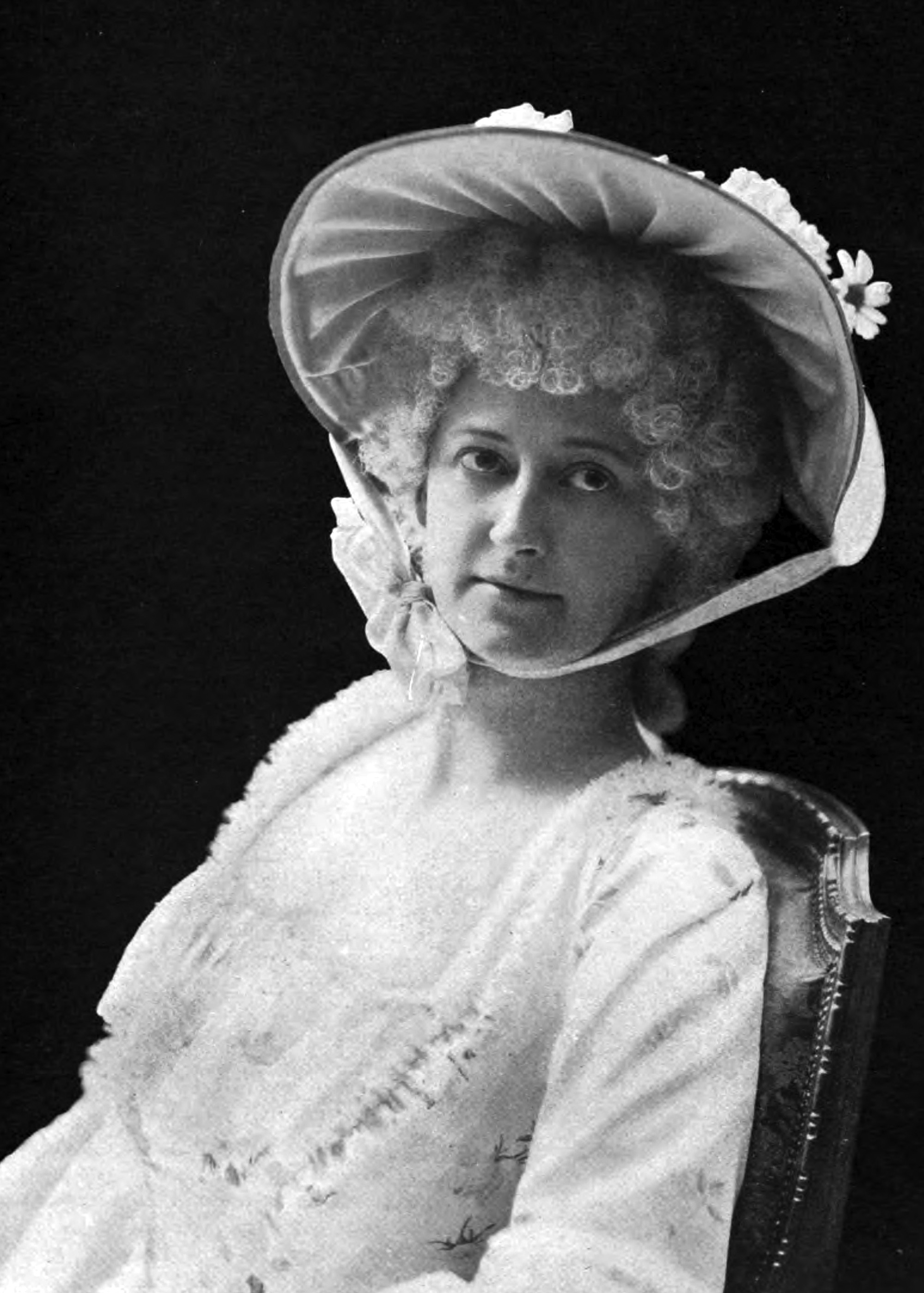 Valborg Hansson (1874-1942) i rollen som Abigael i Ambrosius på Dramaten 1906.